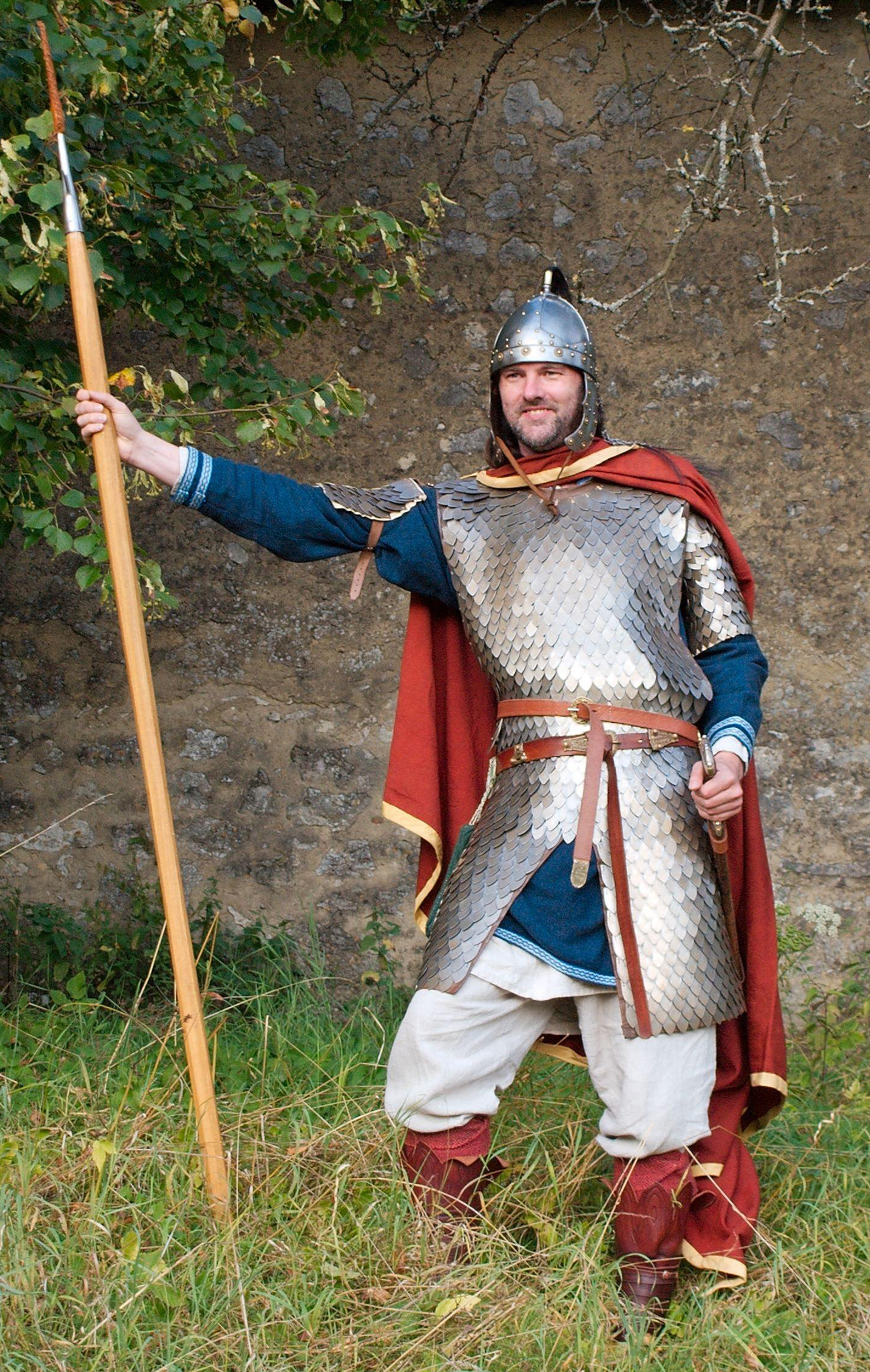 Darstellung eines karolingischen Panzerreiters mit experimentellem Rekonstruktionsversuch eines Schuppenpanzers. Einige Details des Panzers sind aufgrund der fehlenden Fundlage unklar. Der Panzer wurde bereits mehrfach verändert und an experimentell gewonnene Erkenntnisse zur Funktionalität angepasst. (Schulterpartie war früher anders, streng nach Psalterbild, erwies sich aber als untauglich.)